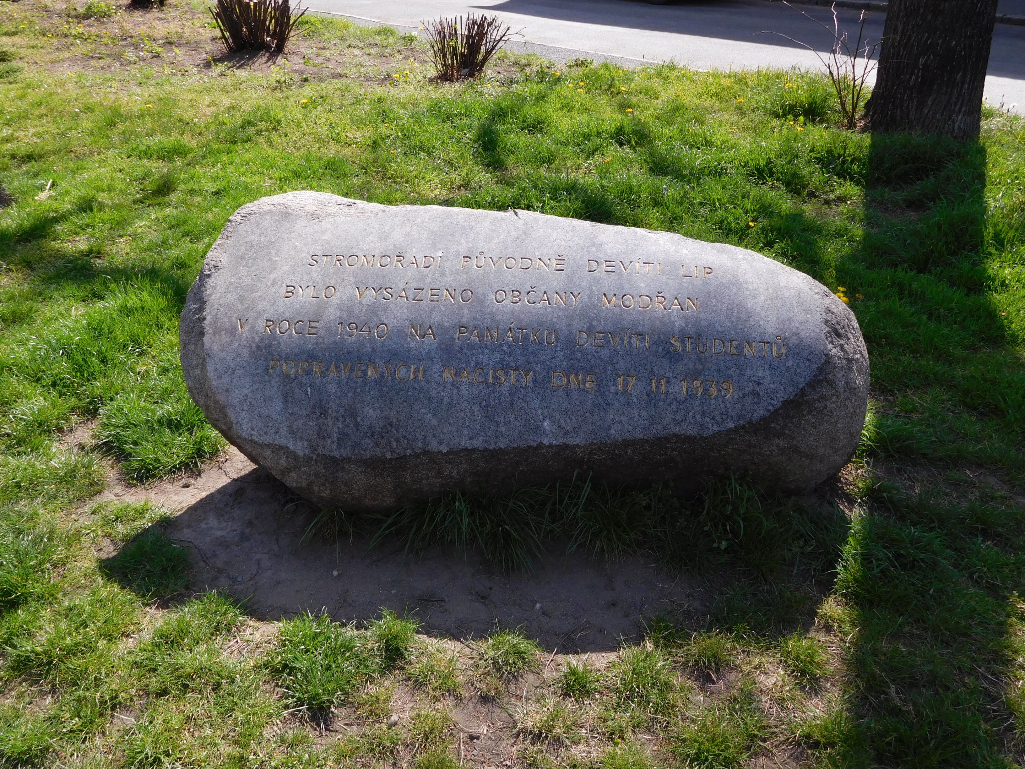 Praha - Modřany, pamětní kámen studentům popraveným 17.11.1939